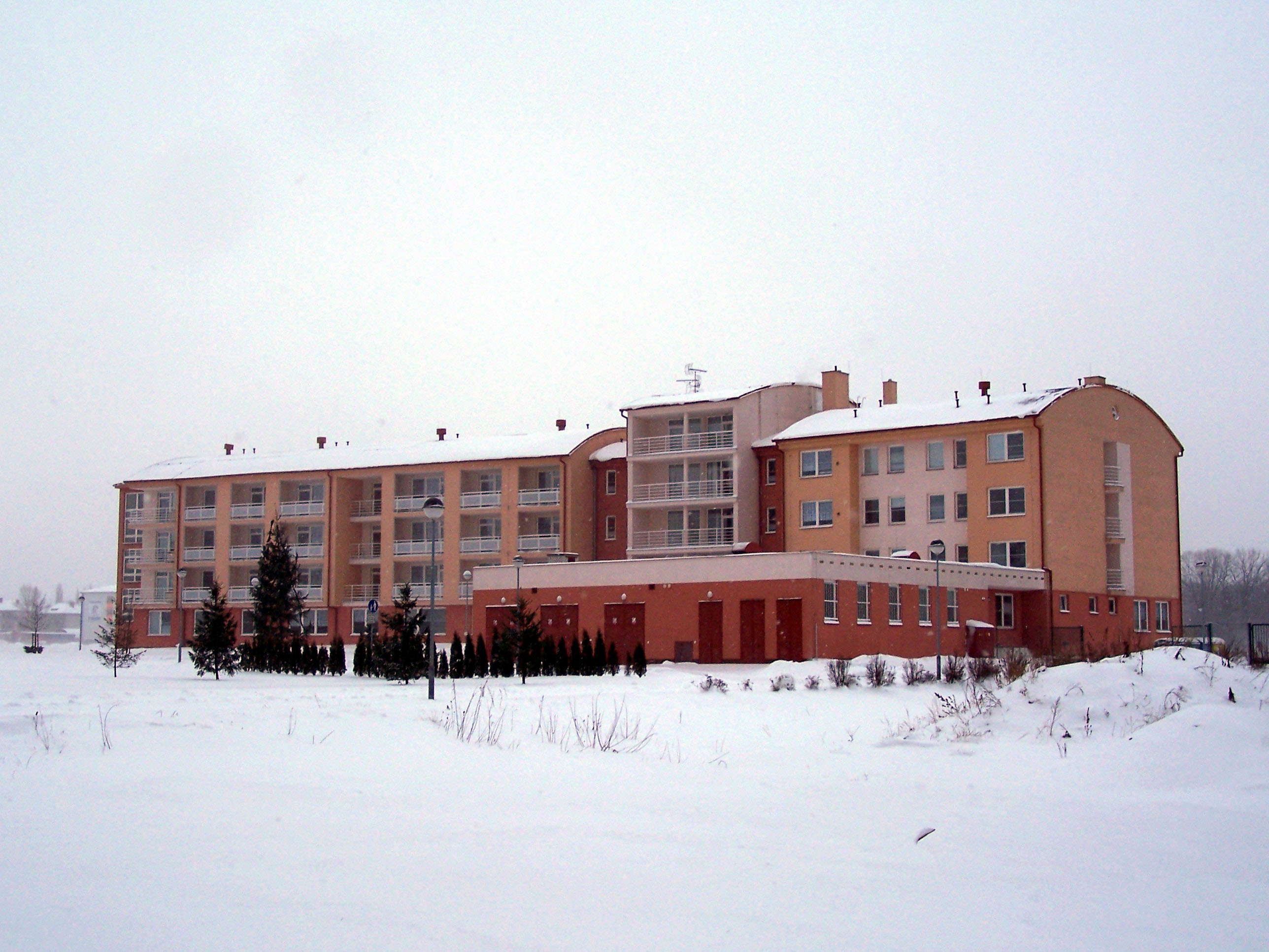 Rest home for seniors in Český Těšín (Czeski Cieszyn)